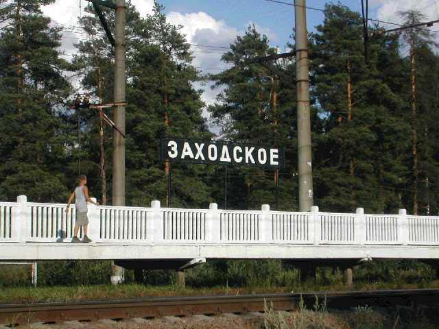 Железнодорожная платформа Заходское на линии СПб - Выборг